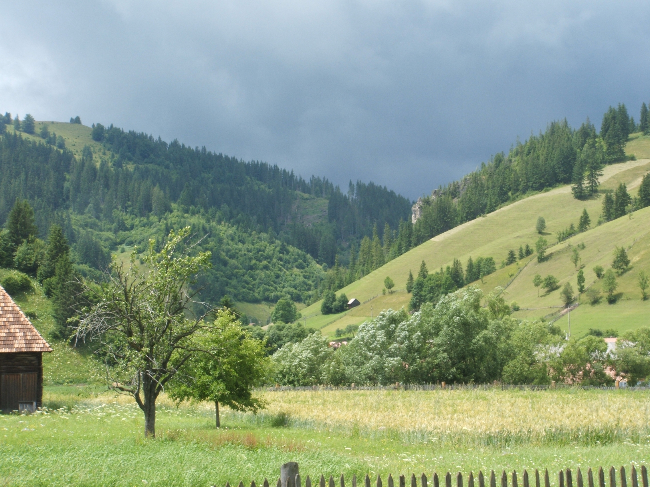 Gyimesi táj Gyimesközéploknál